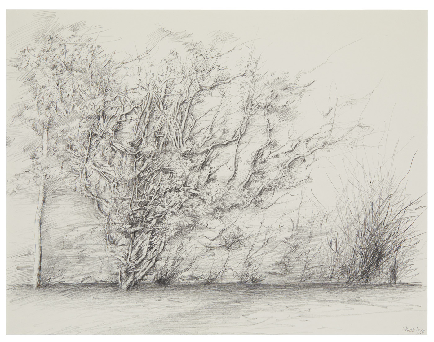 Ev Grüger - Efeumauer, 1987, Zeichnung, Tuschestift©Estate Ev Grüger